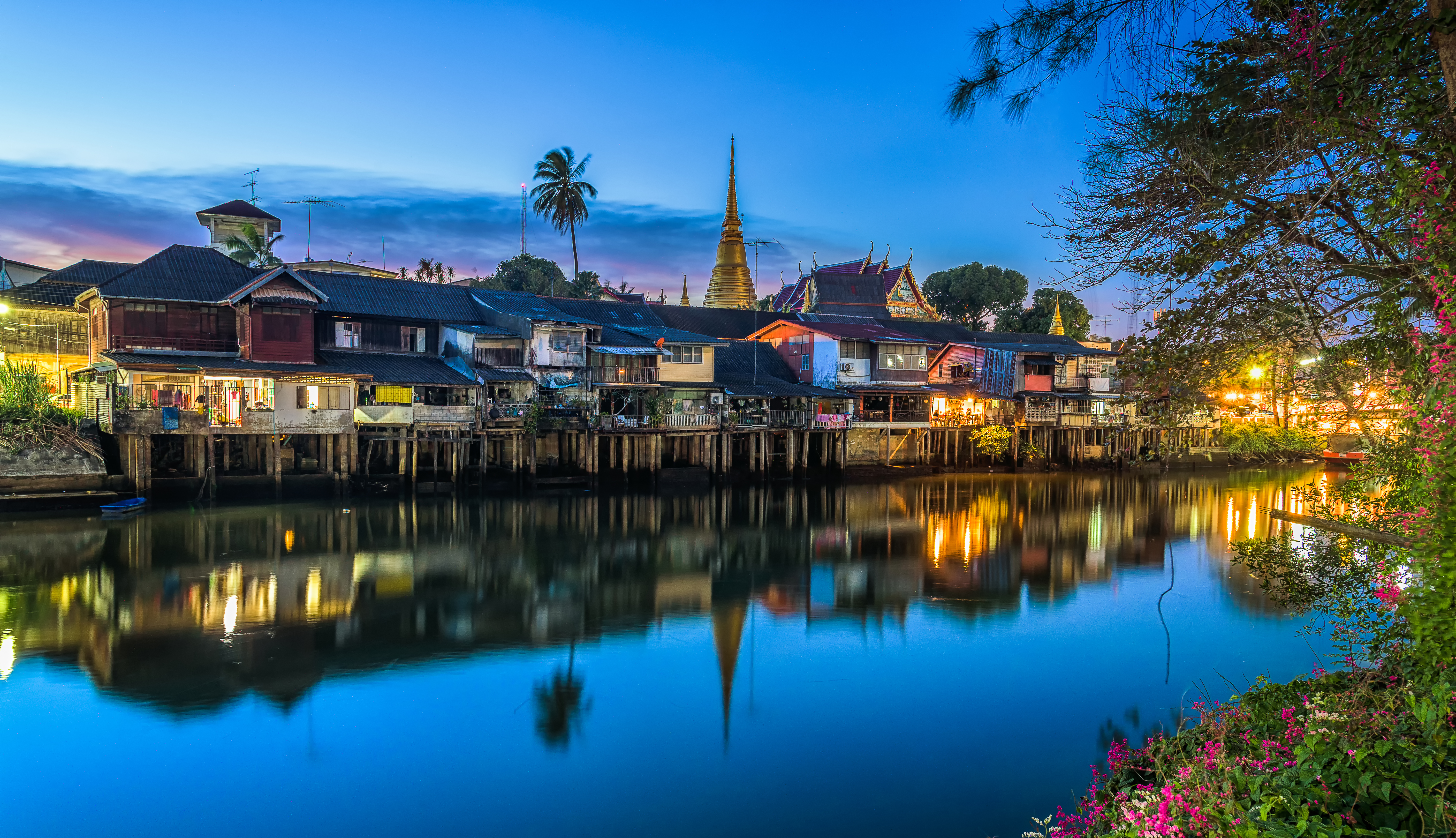 ภาพชุมชนเก่าแก่ริมแม่น้ำจันทบุรี ในช่วงพลบค่ำ แสดงให้เห็นบ้านเรือนของคนในชุมชนริมแม่น้ำ